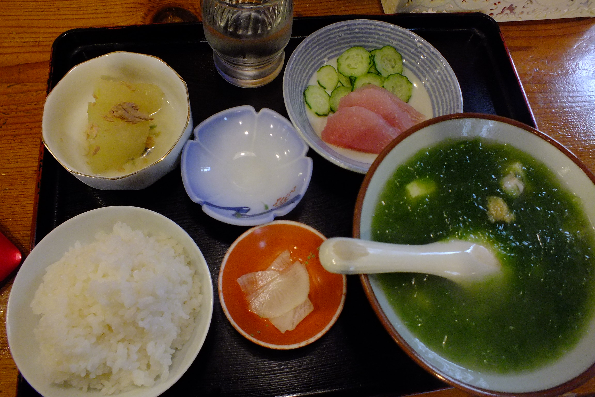 アーサーとは、沖縄の岩場に生える緑色海藻。別名「あおさ」とも言う。島豆腐と「あおさ」の味噌汁がアーサー汁。